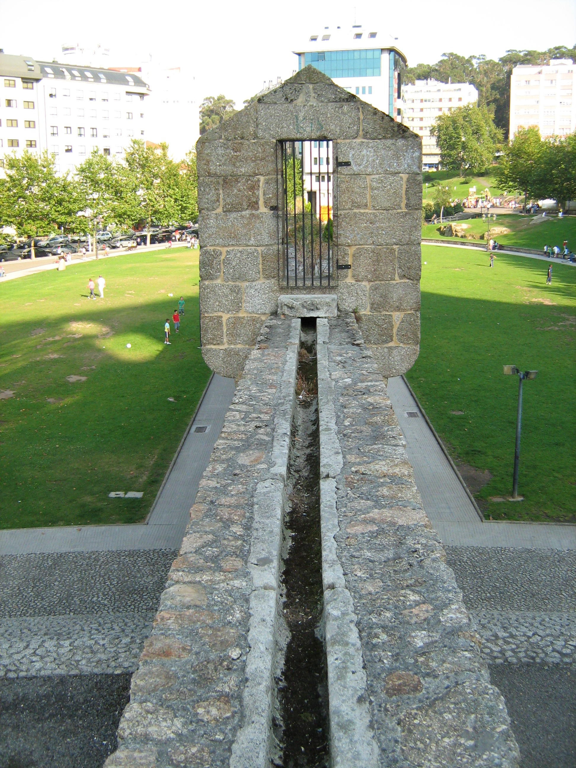 Acueduto do Paseo das Pontes, na Coruña